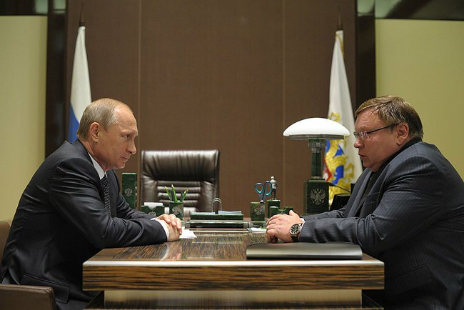 Президент России Владимир Путин и врио губернатора Ивановской области Павел Коньков в Сочи, 19 августа 2014 года